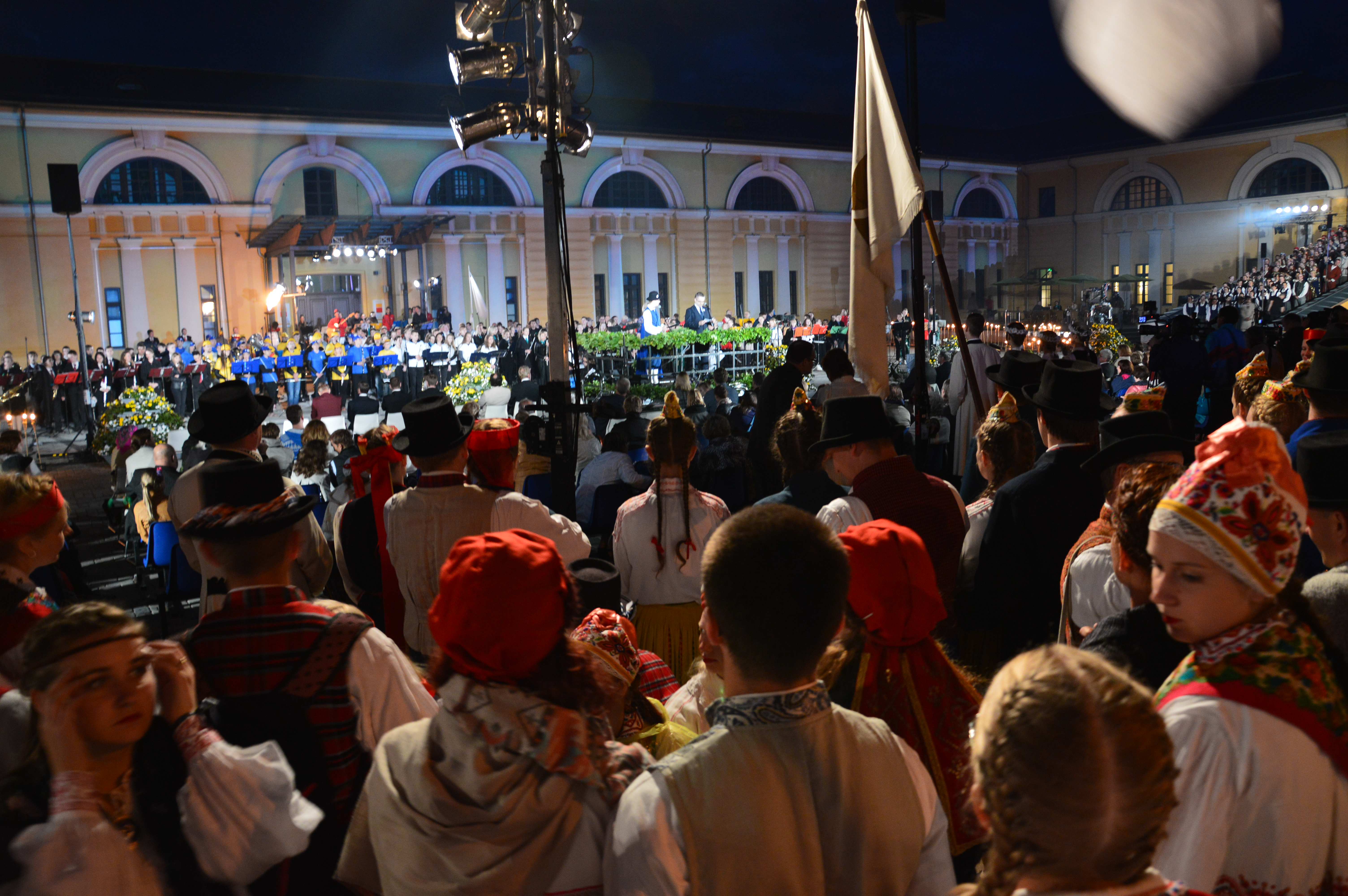 Gaudeamuse avamine Daugavpilsi kindluses.